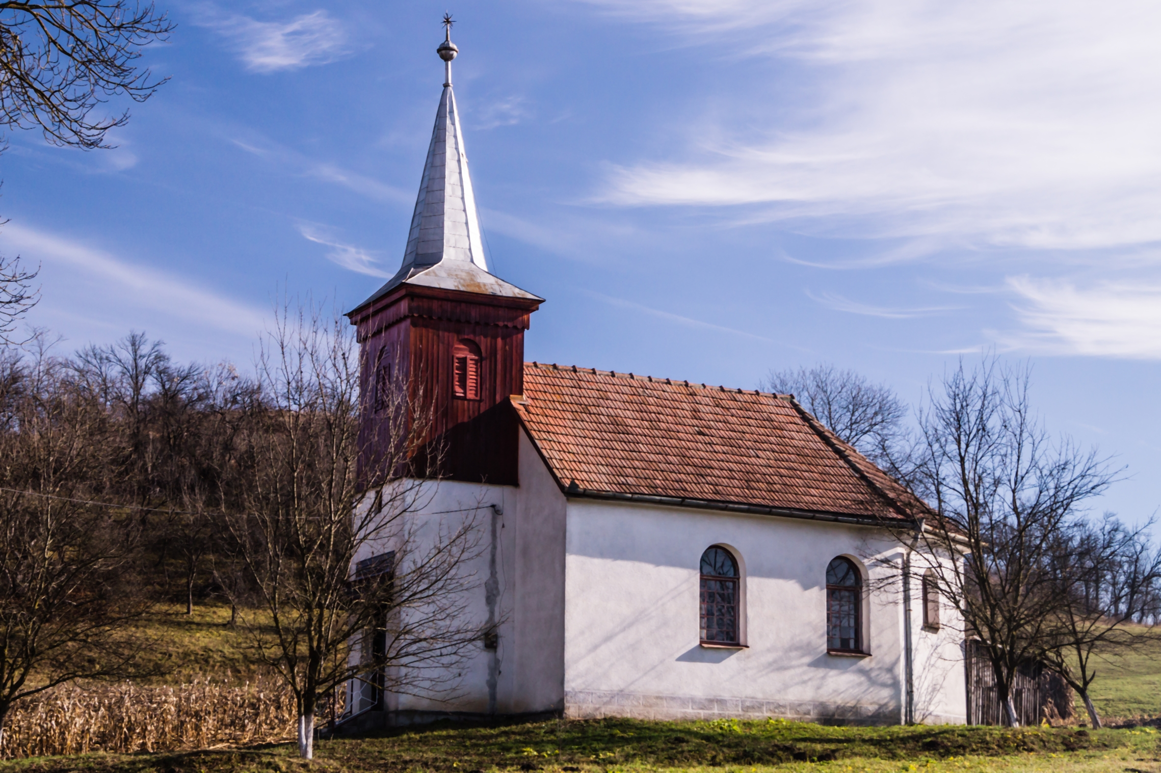 Székelysárd, református templom